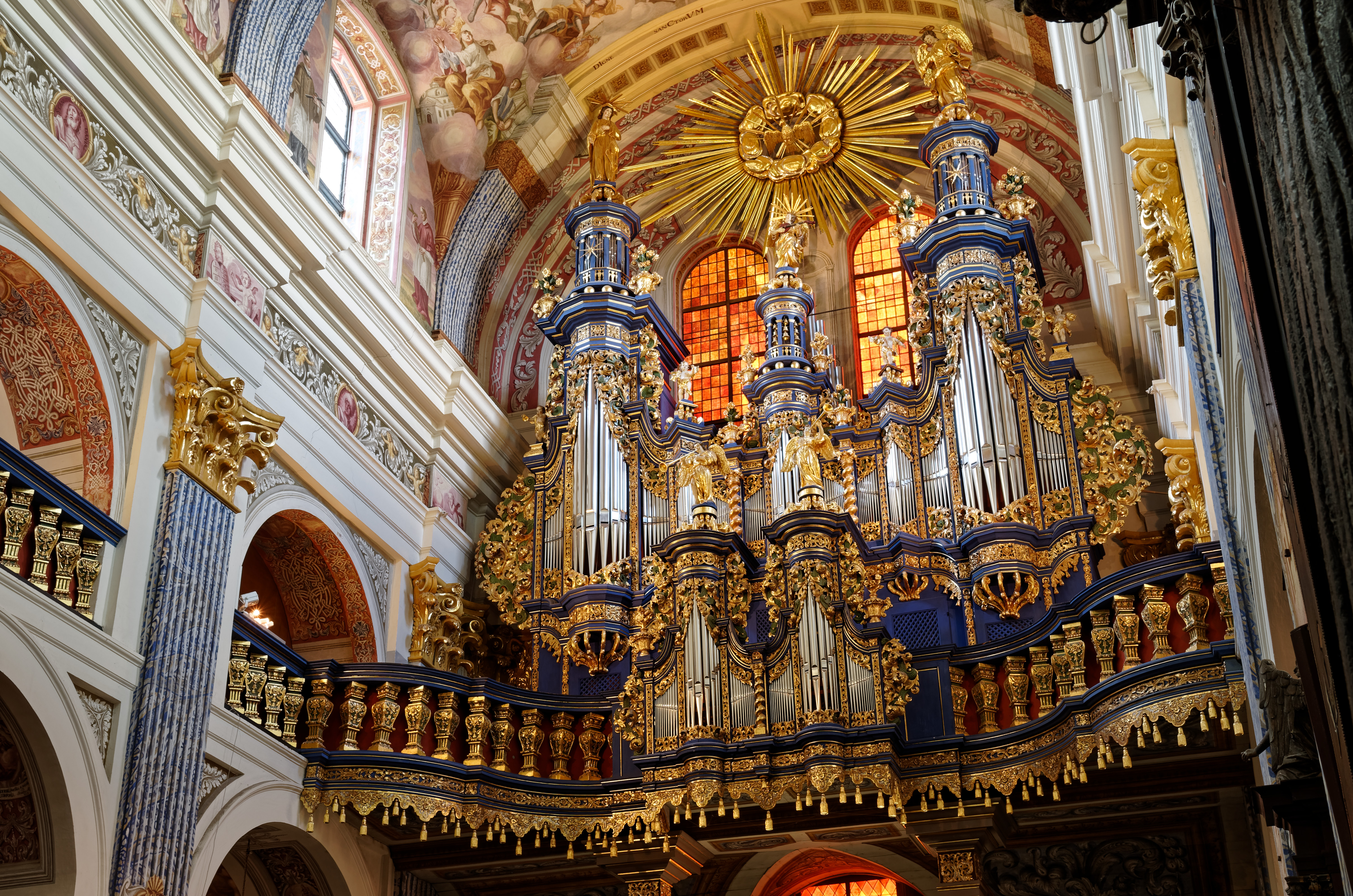 Zdjęcie barokowych organów w kościele Nawiedzenia Najświętszej Maryi Panny w Świętej Lipce.